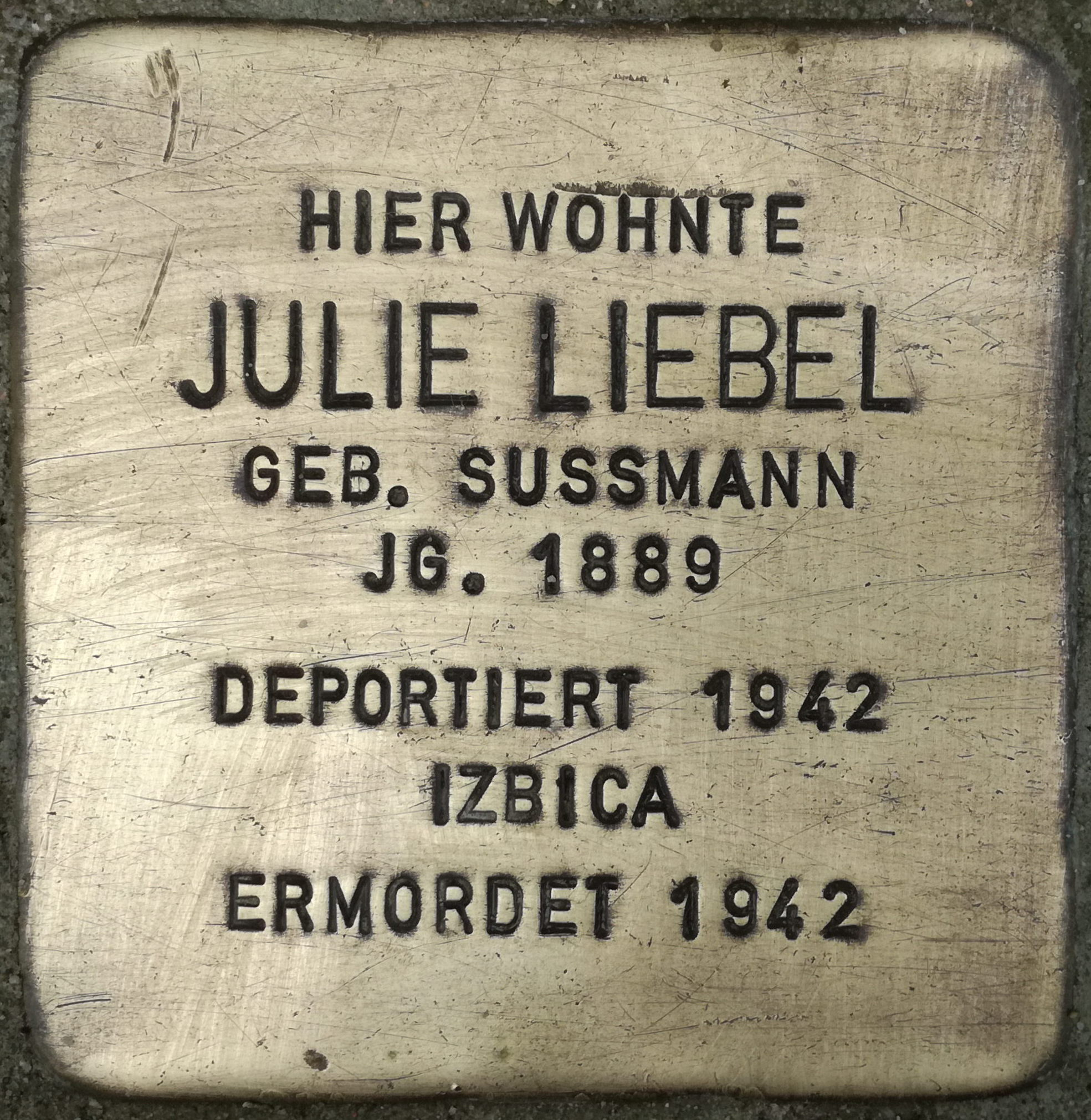 Hier wohnte Julie Liebel geb. Sussmann Jahrgang 1889 deportiert 1942 Izbica ermordet 1942